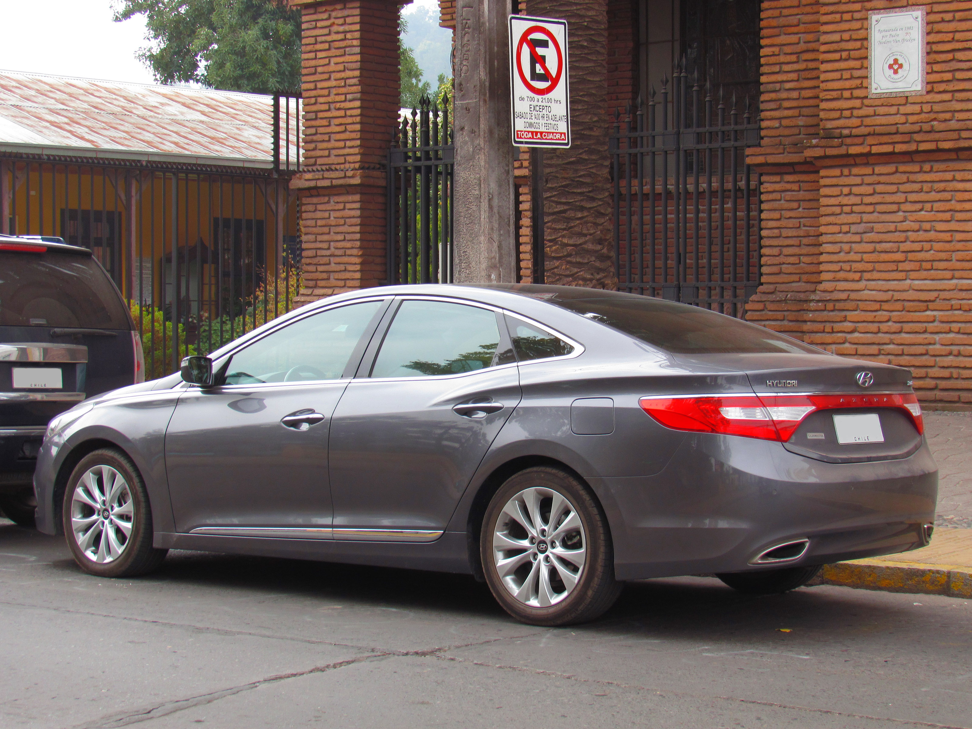 Hyundai Azera V6 GLS 2013